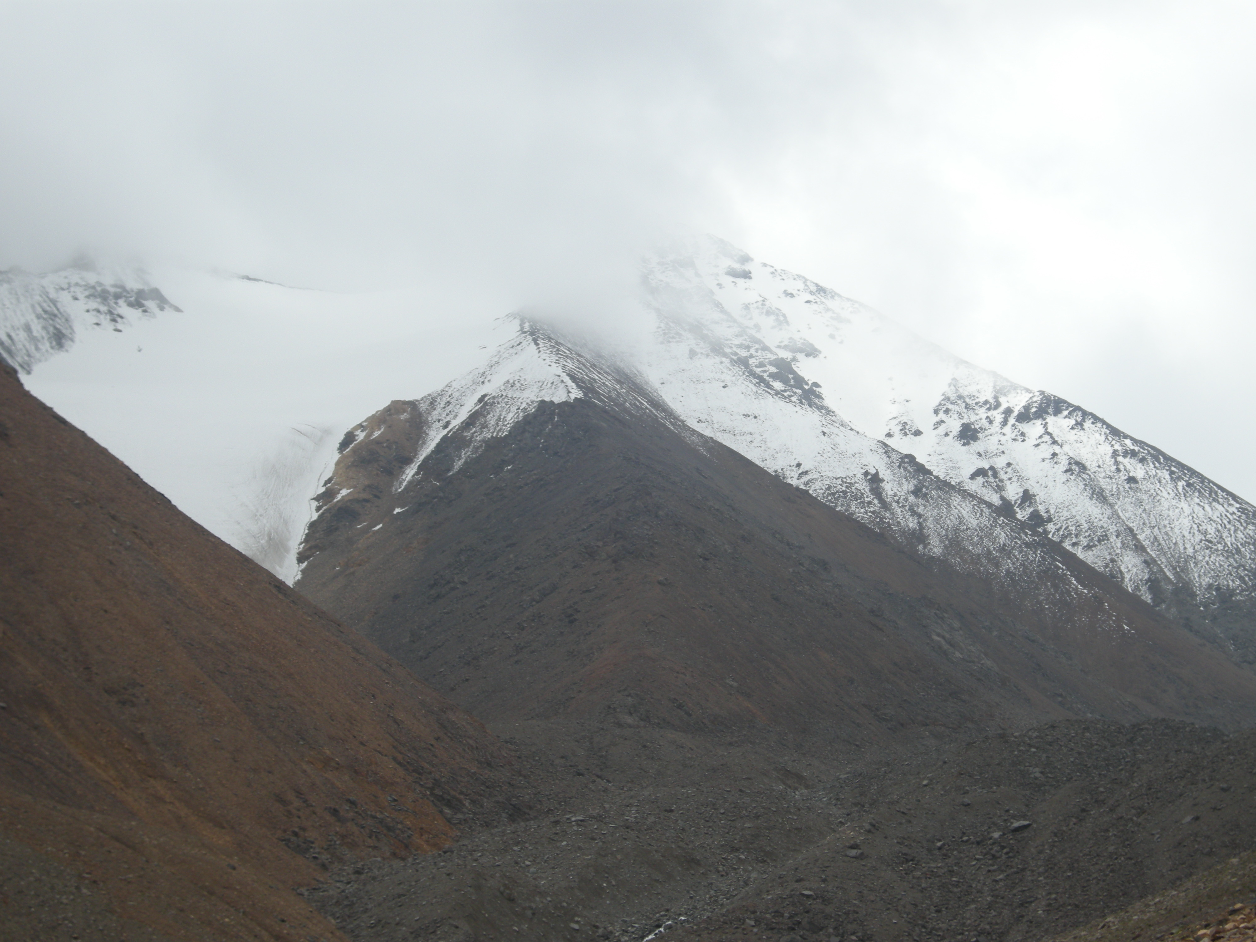 七一冰川的照片